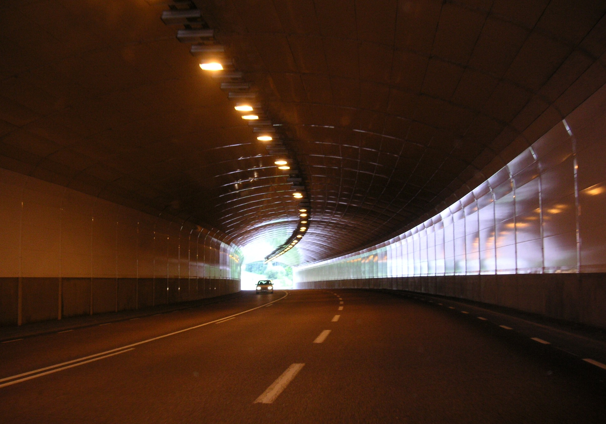 Lindötunneln på Ekerövägen, Ekerö